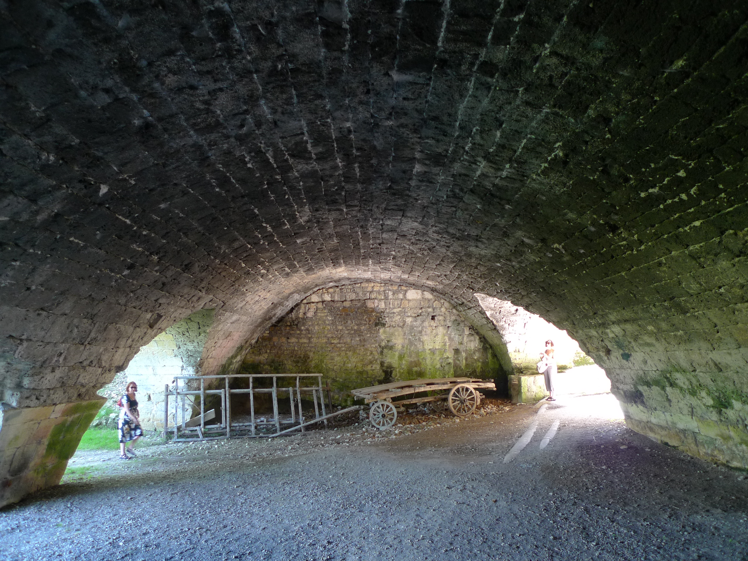 Abbaye d'Hautecombe (Classé) .